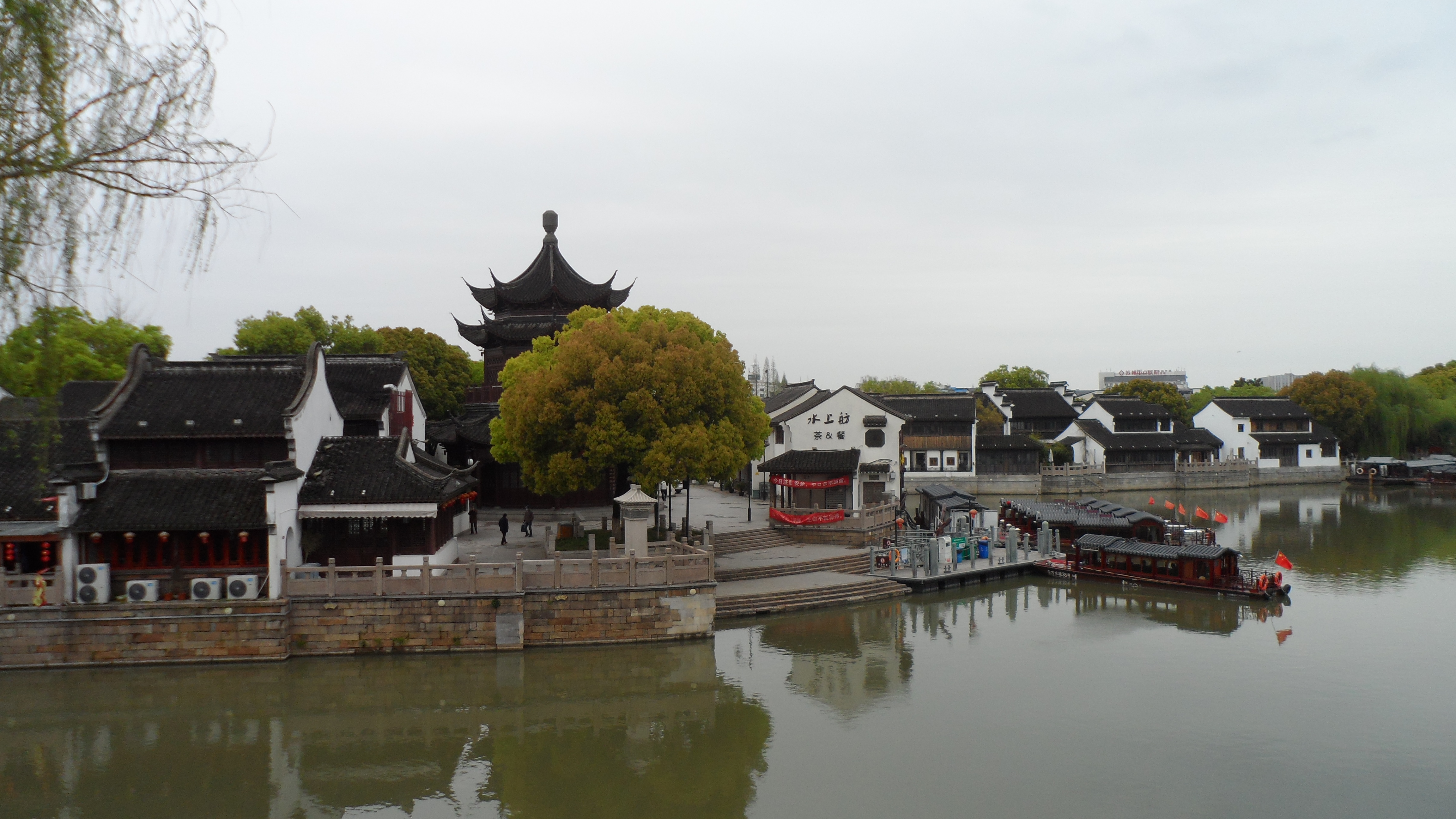 Chang Men Wharf